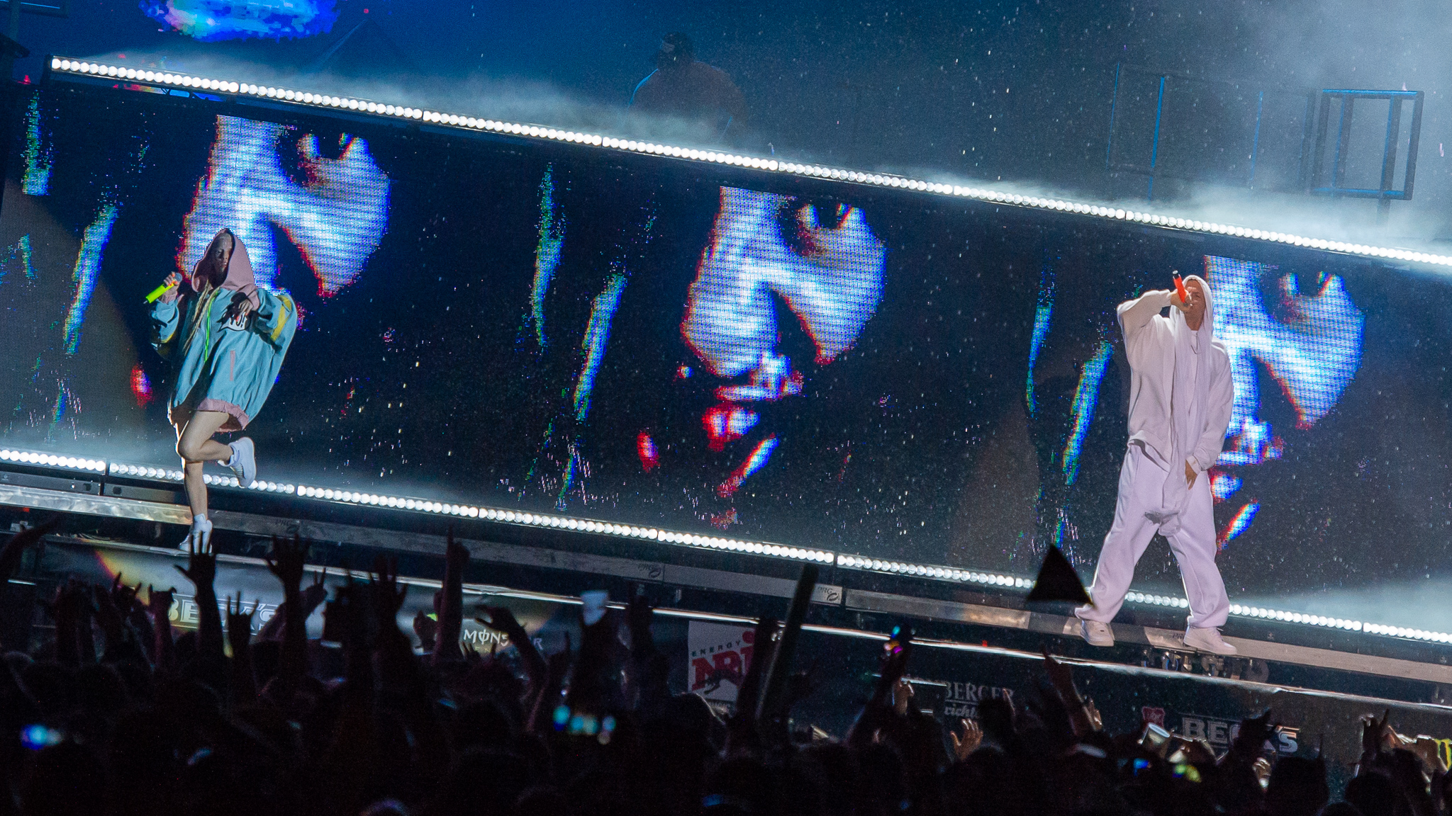 ARGO-Konzerte,Anri du Toit,Beck's Park Stage,Die Antwoord,Konzert,Livekonzert,Livemusik,Musik,Ninja,RiP,Rock im Park 2019,Watkin Tudor Jones,Yolandi Visser